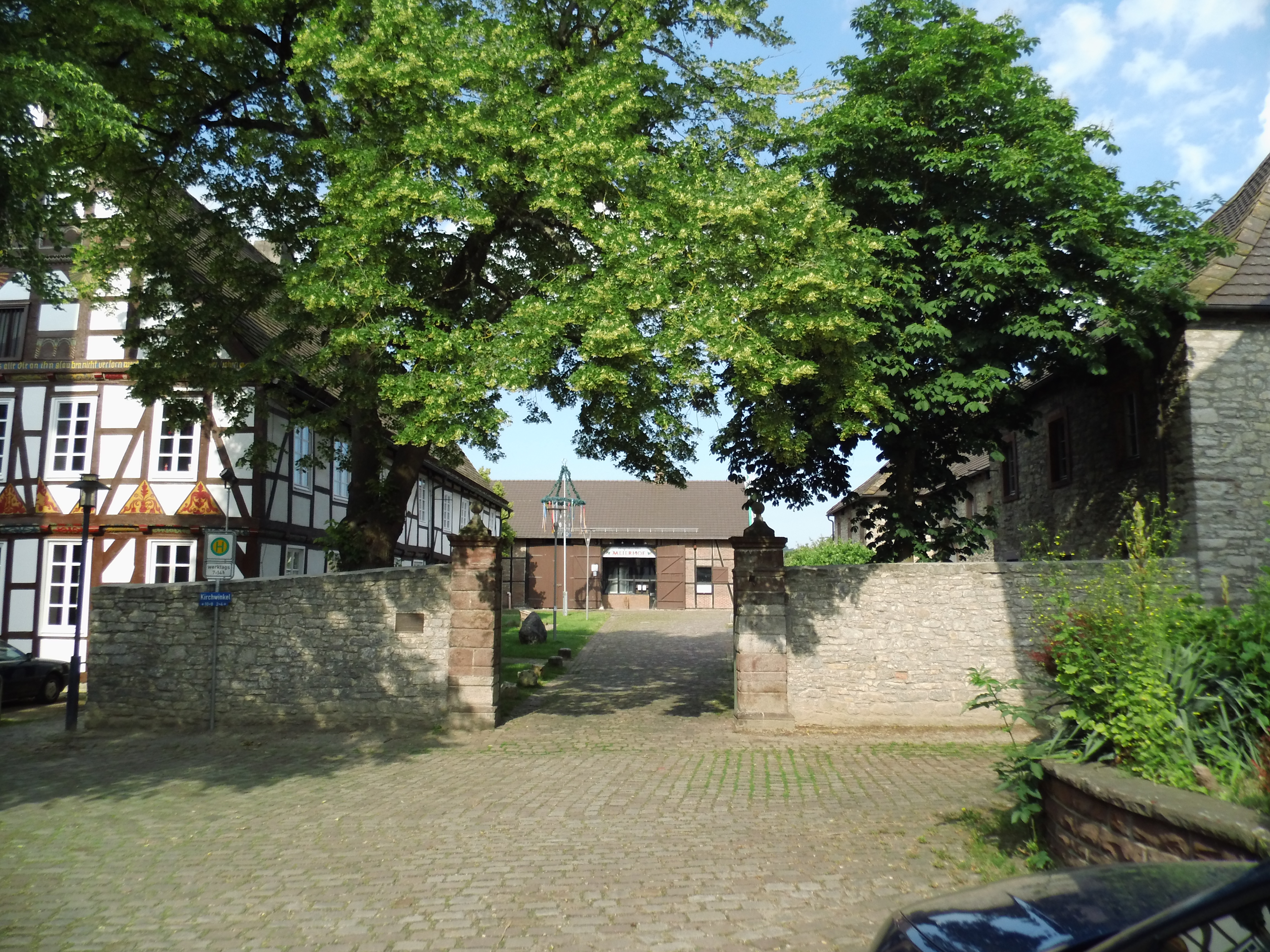 Baudenkmal, Liste der Baudenkmäler in Höxter